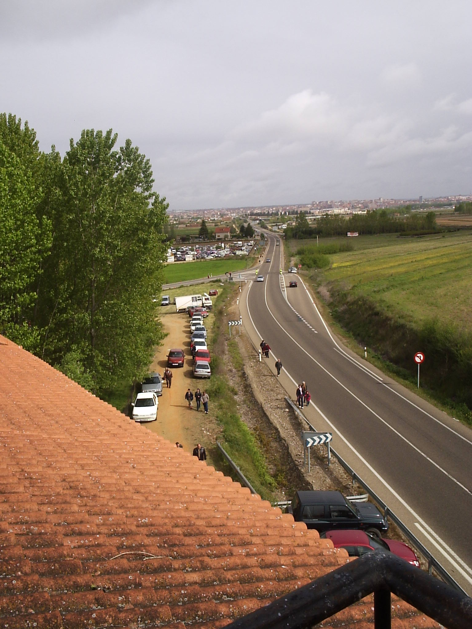 Carretera N630 Ruta de la Plata desde la Ermita del Cristo de Morales, entre Morales y Zamora. Al fondo, la ciudad de Zamora. Foto tomada el día 9 de mayo.